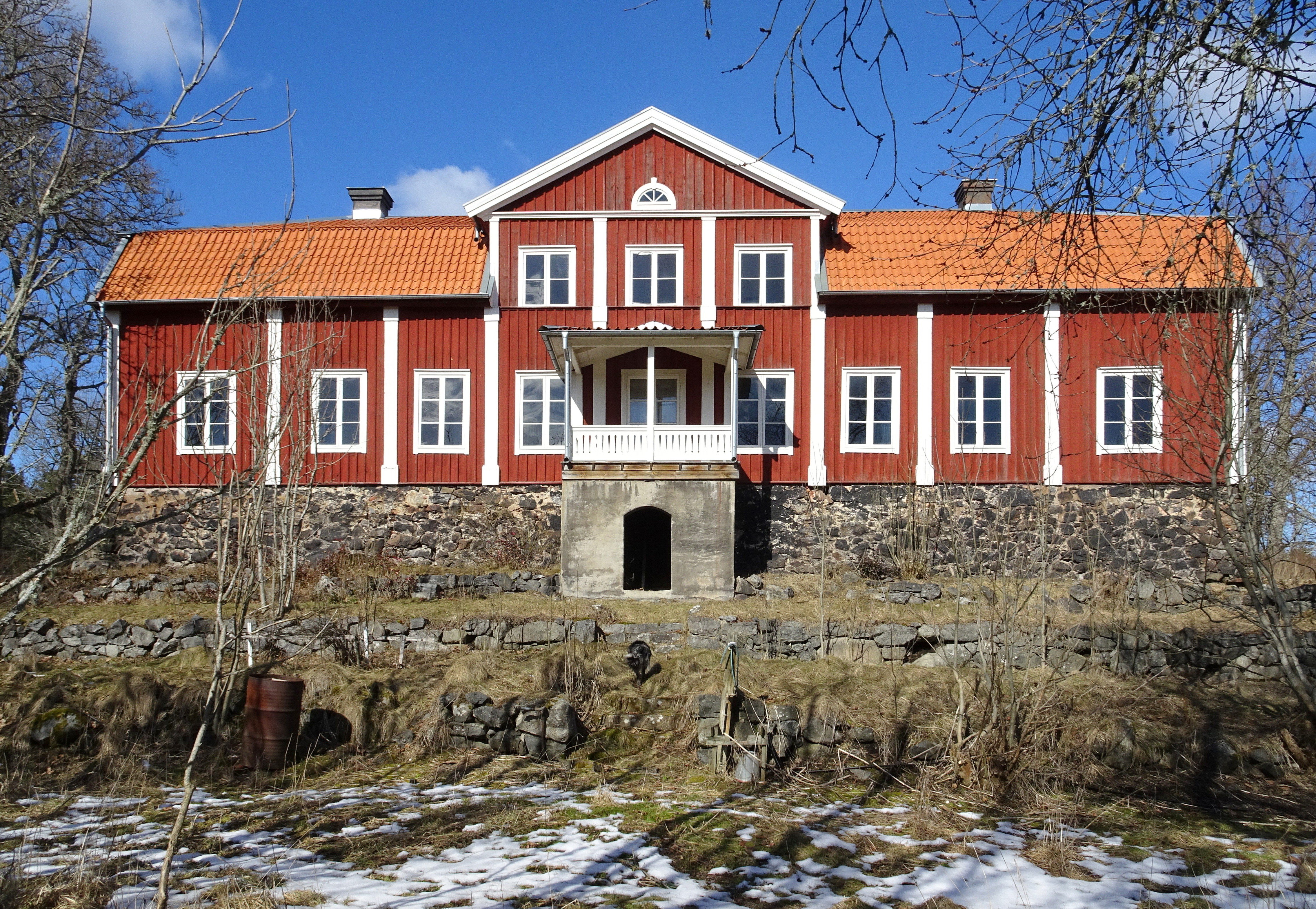 Näringsberg, huvudbyggnad, sydsida